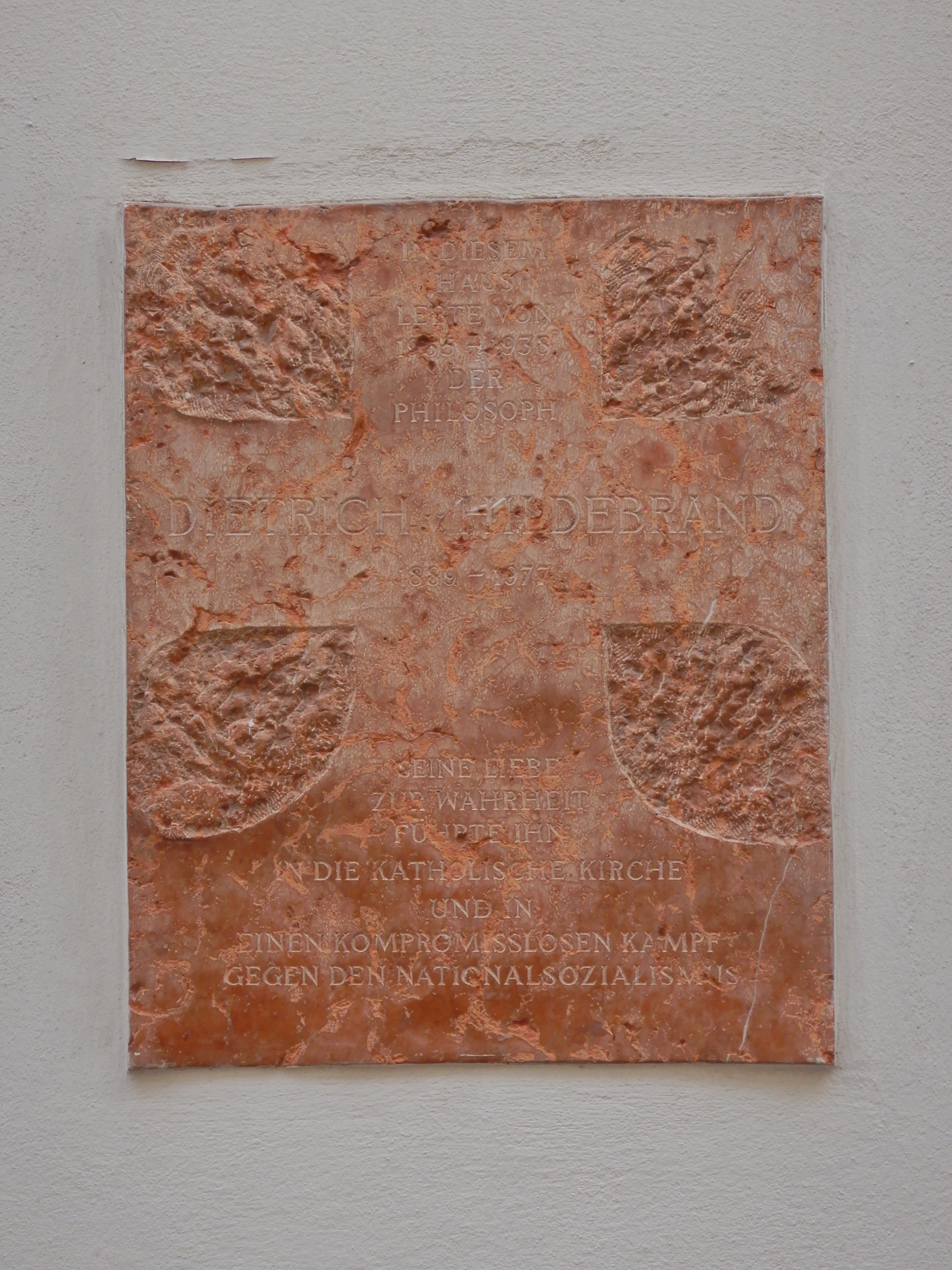 Gedenktafel für Dietrich von Hildebrand (Wien, Habsburgergasse 5)